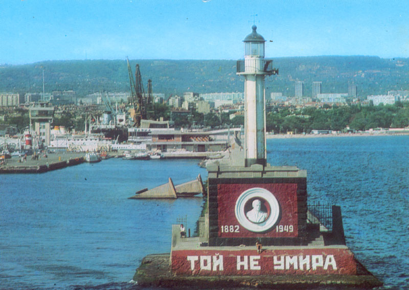 Фарът на пристанищния вълнолом. Барелефът с лика на Георги Димитров и надпис: "Той не умира".